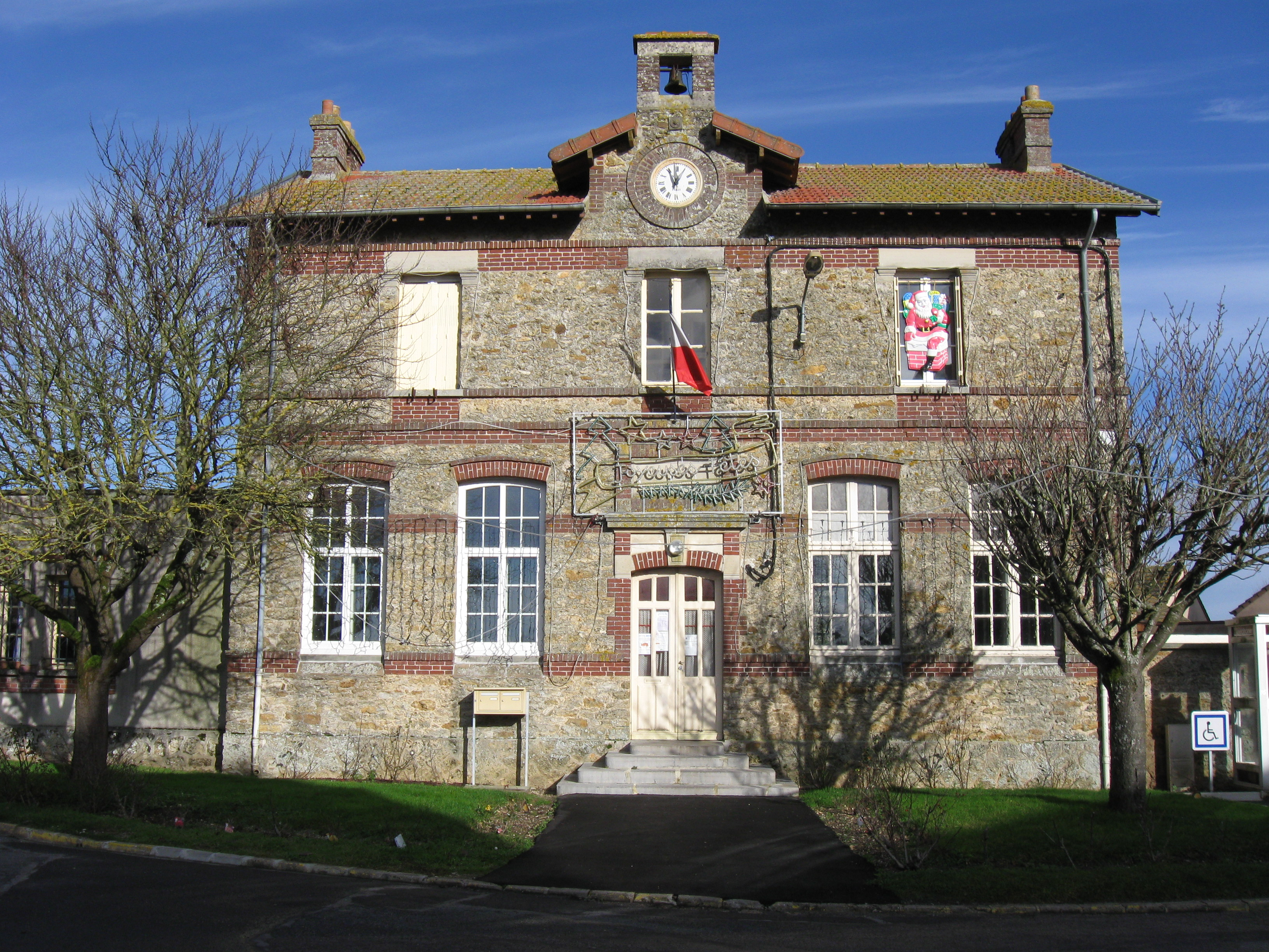 Mairie de Les Chapelles-Bourbon. (Seine-et-Marne, région Île-de-France).